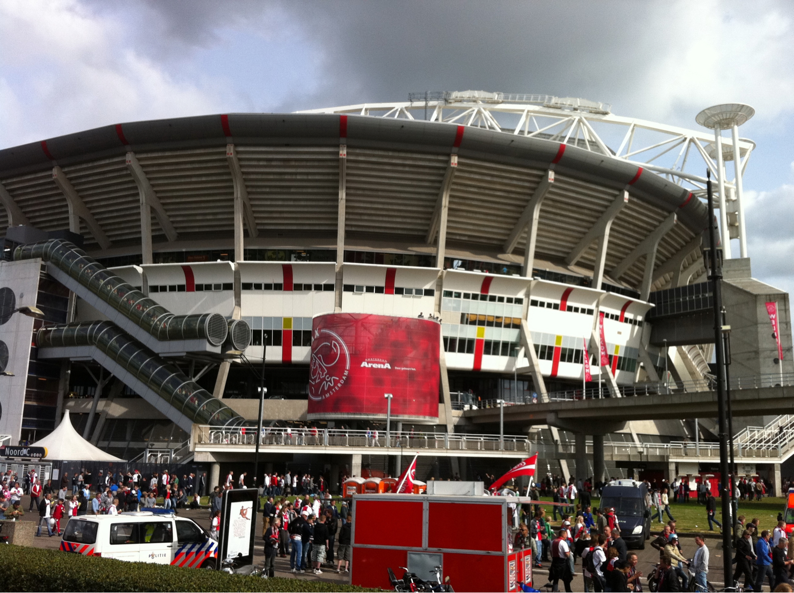 Ajax vs. Twente 3-1, Eredivisie, 15-May-2011, Amsterdam ArenA